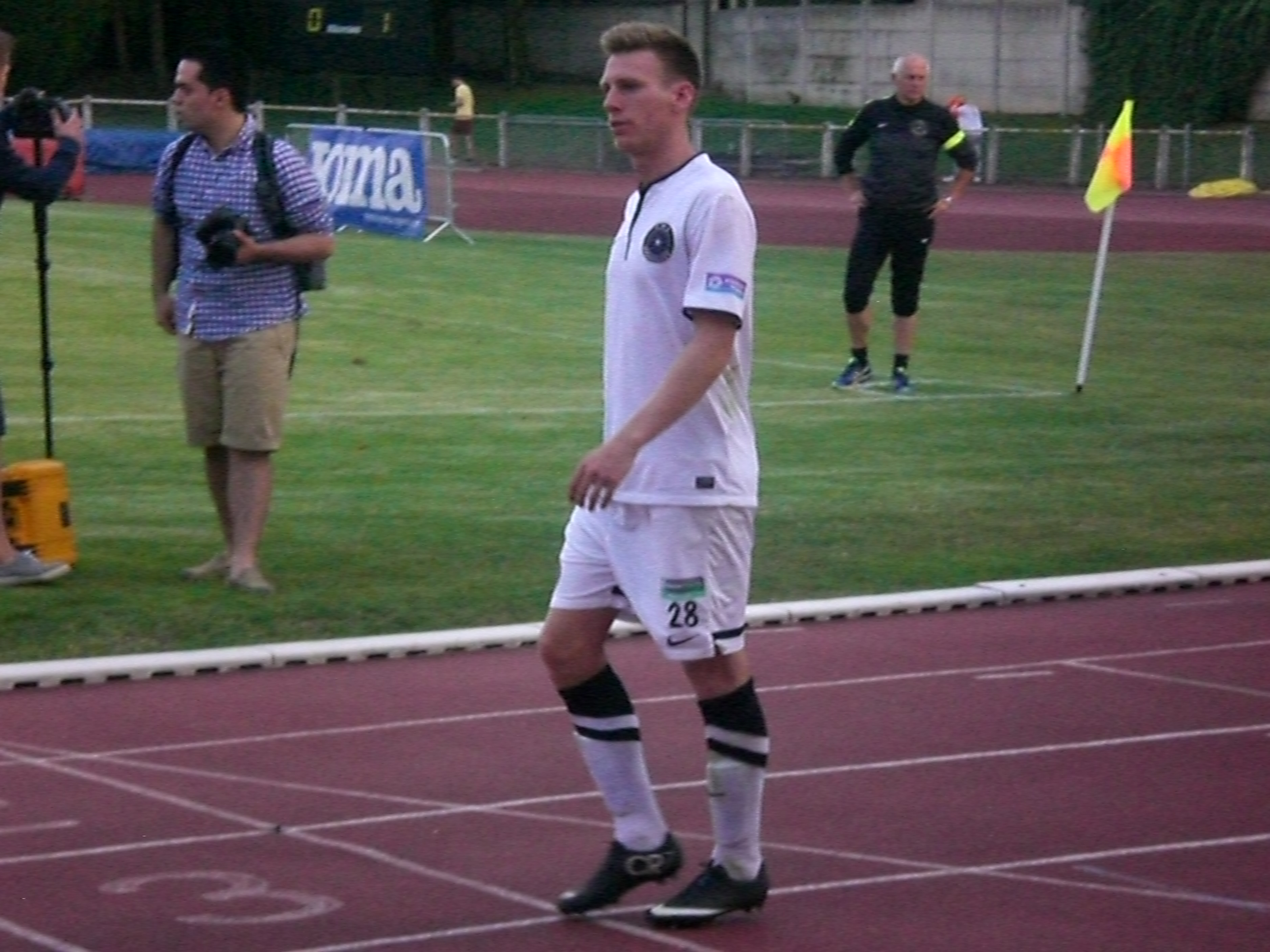 Jérémy Huyghebaert à la fin du match amical RC Lens - RWS Bruxelles, le 24 juillet 2015, au Stade Démény de Douai.